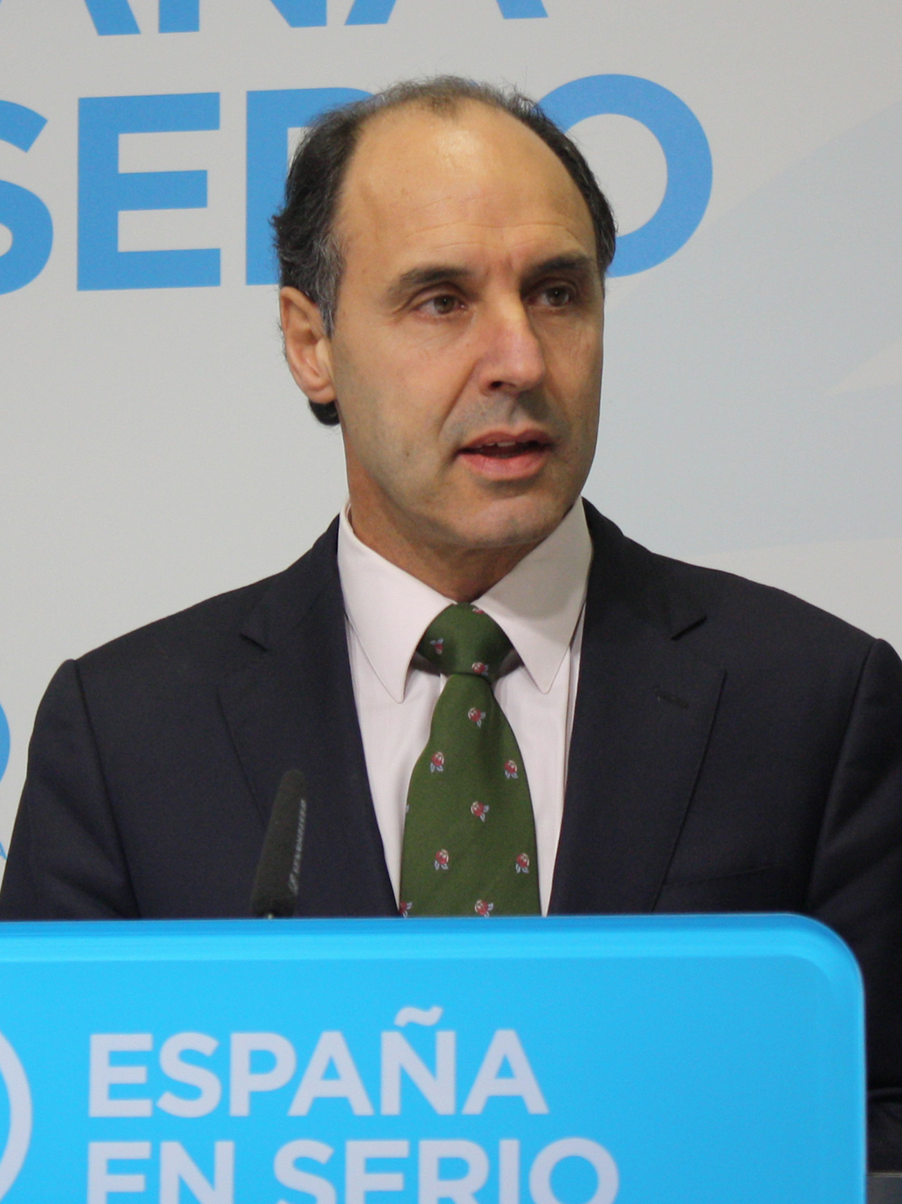 El presidente del Partido Popular de Cantabria, Ignacio Diego, ofreció una rueda de prensa sobre el convenio con Guipúzcoa para el vertido de basura en Cantabria.